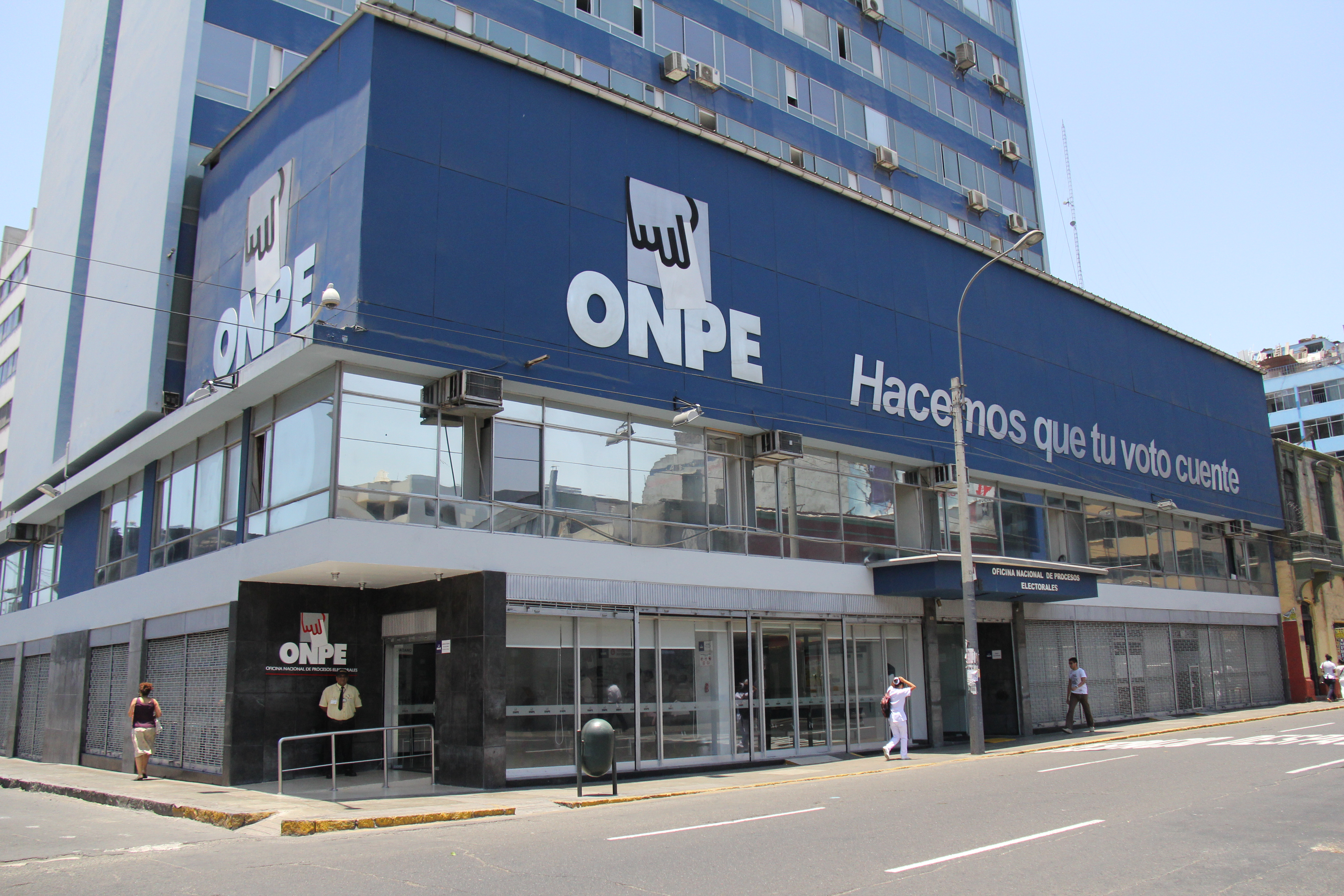 Fachada de la ONPE